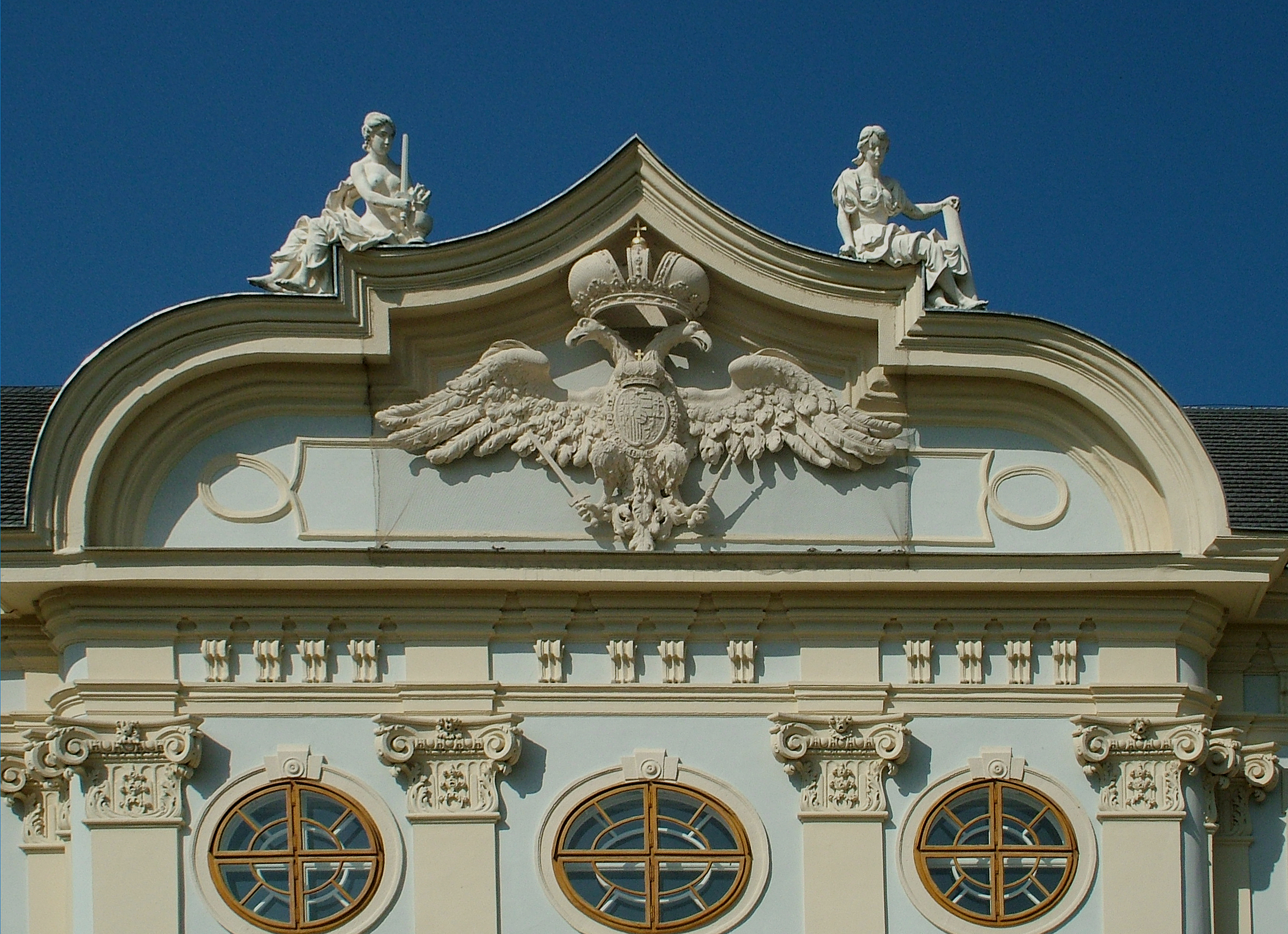 Halbturn (Féltorony): a kastély főhomlokzatának részlete (Ausztria)